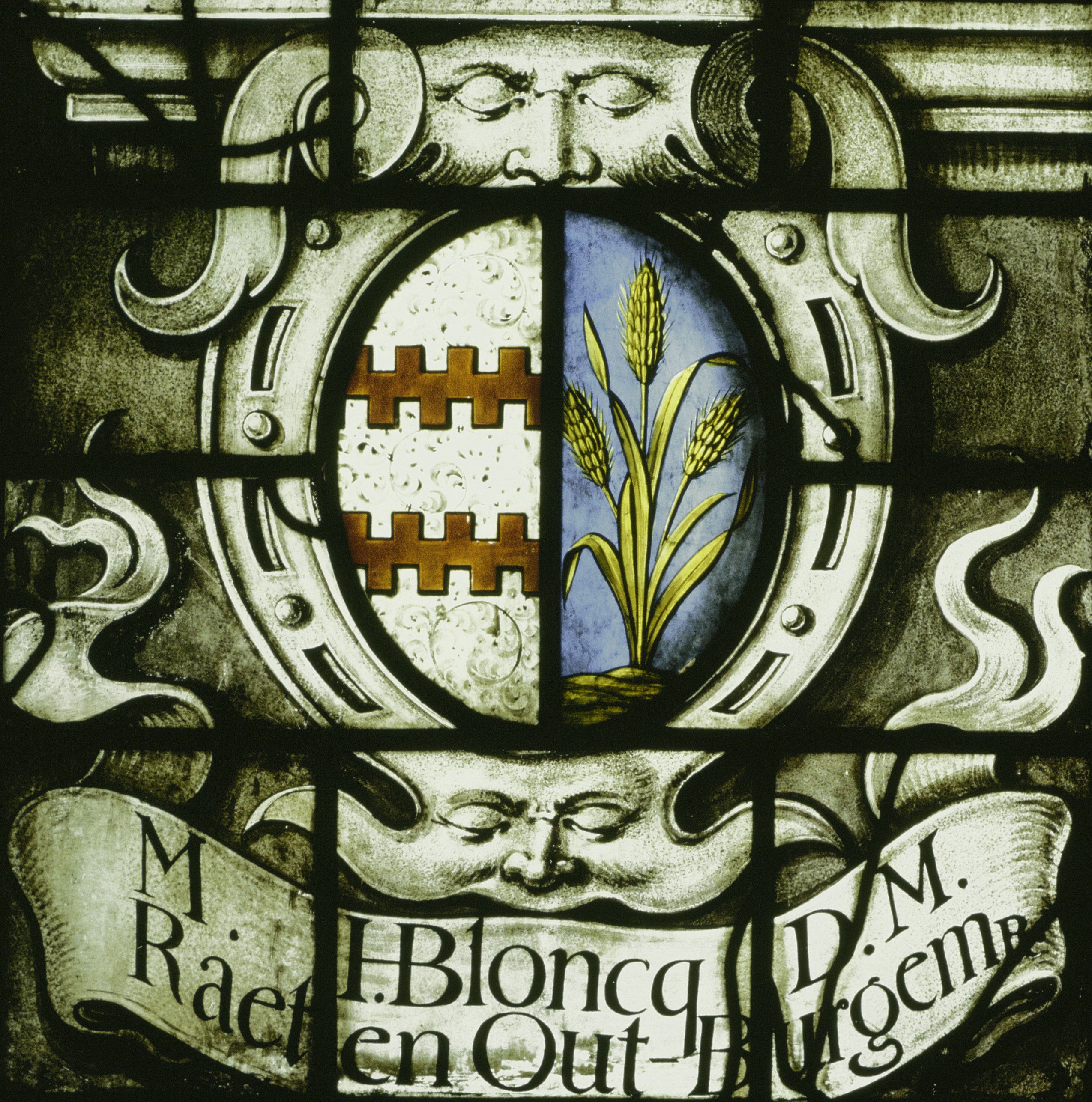 Sint Janskerk: interieur, glas in loodraam NR. 22, detail A 5